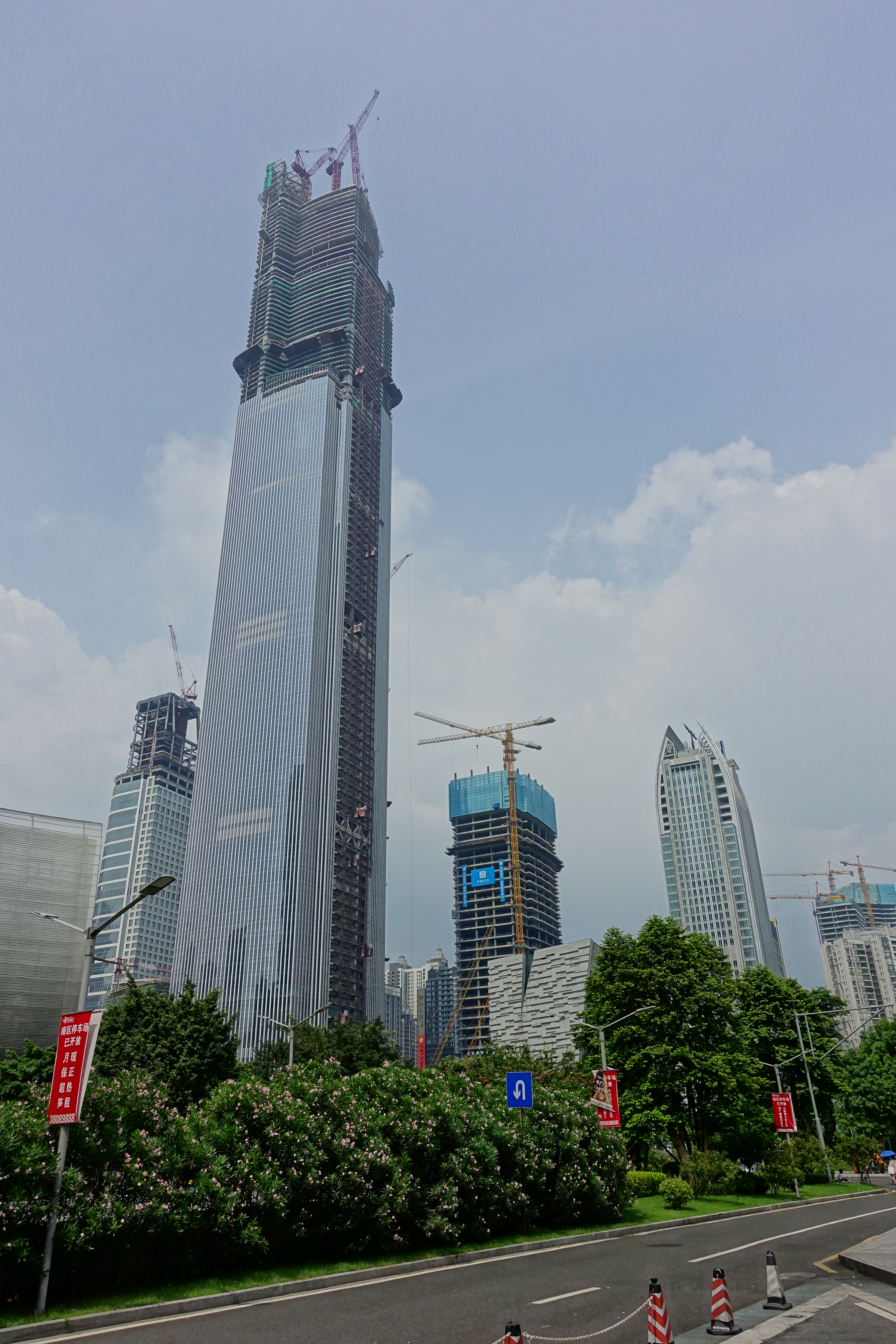 Chow Tai Fook Centre, Guangzhou (Jul 2014)